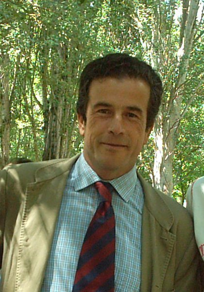 Juan Miguel Osorio y Bertrán de Lis, conocido como Ioannes Osorio, duque de Alburquerque y de Algete, marqués de Alcañices, Cuéllar, Cullera, Cadreita y de Montaos, conde de Huelma, Ledesma, Fuensaldaña, Grajal, Villanueva de Cañedo, etc. Grande de España. Foto tomada con motivo de la cesión del Parque de la Huerta del Duque por dicho duque al Ilmo. Ayuntamiento de Cuéllar, en fecha de 17 de junio de 2006.